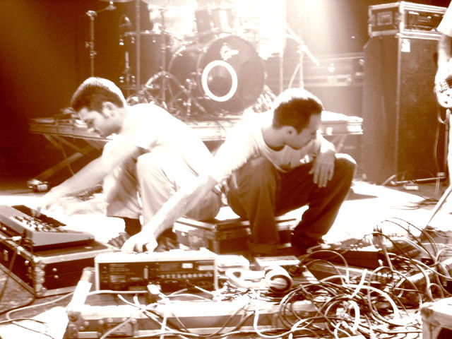 Balago a Sala Apolo, el 2004.